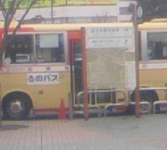 西東京バスるのバス「車両代替/JR秋川駅にて」